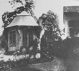 Беларуская (тарашкевіца): Магілёўцы (Mahiloŭcy), сядзіба Быхаўцаў (Bychaviec). Капліца